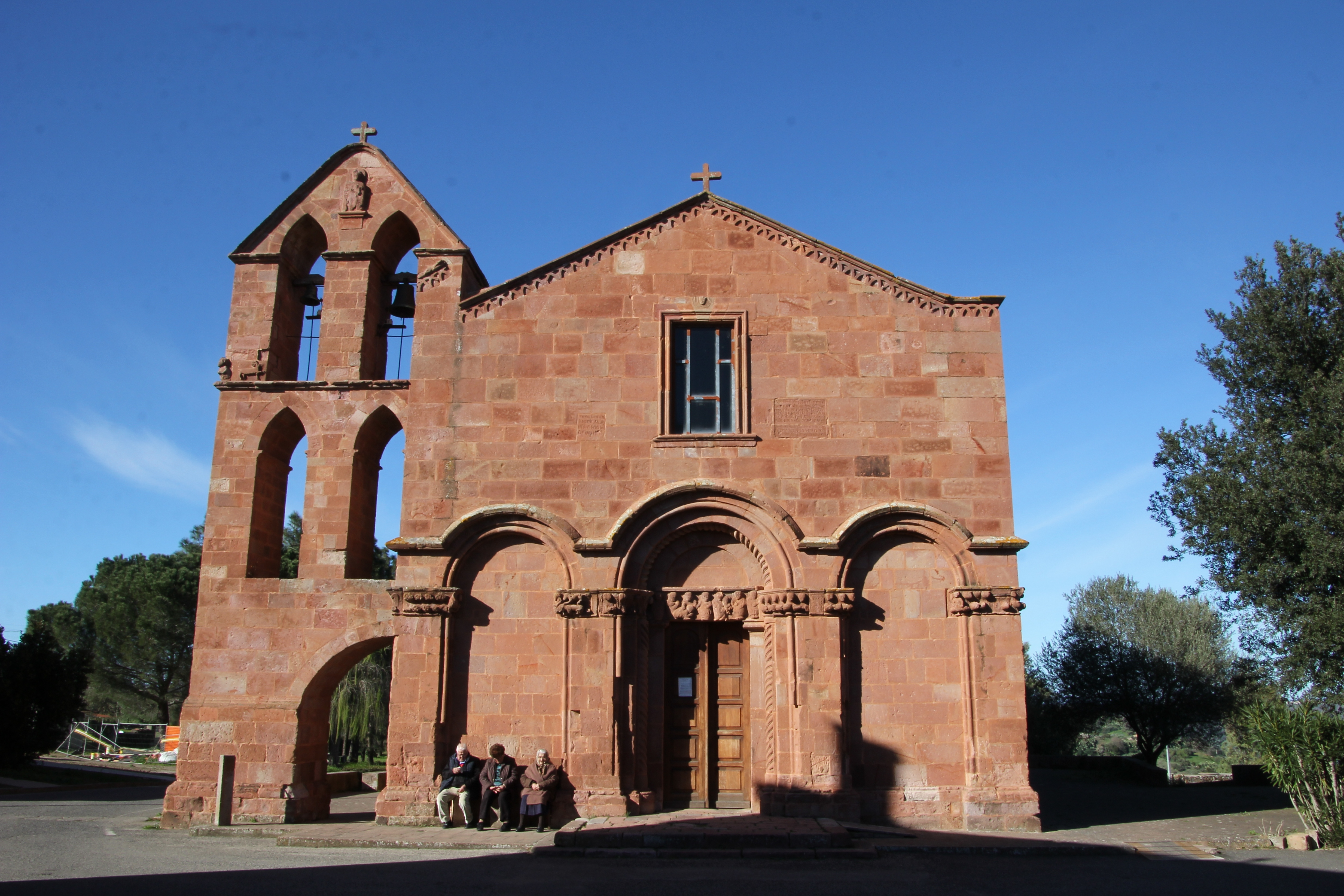 Ghilarza, frazione Zuri, chiesa di San Pietro